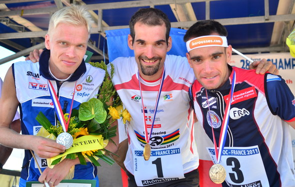 Men Podium Long Distance (J.kocbach)